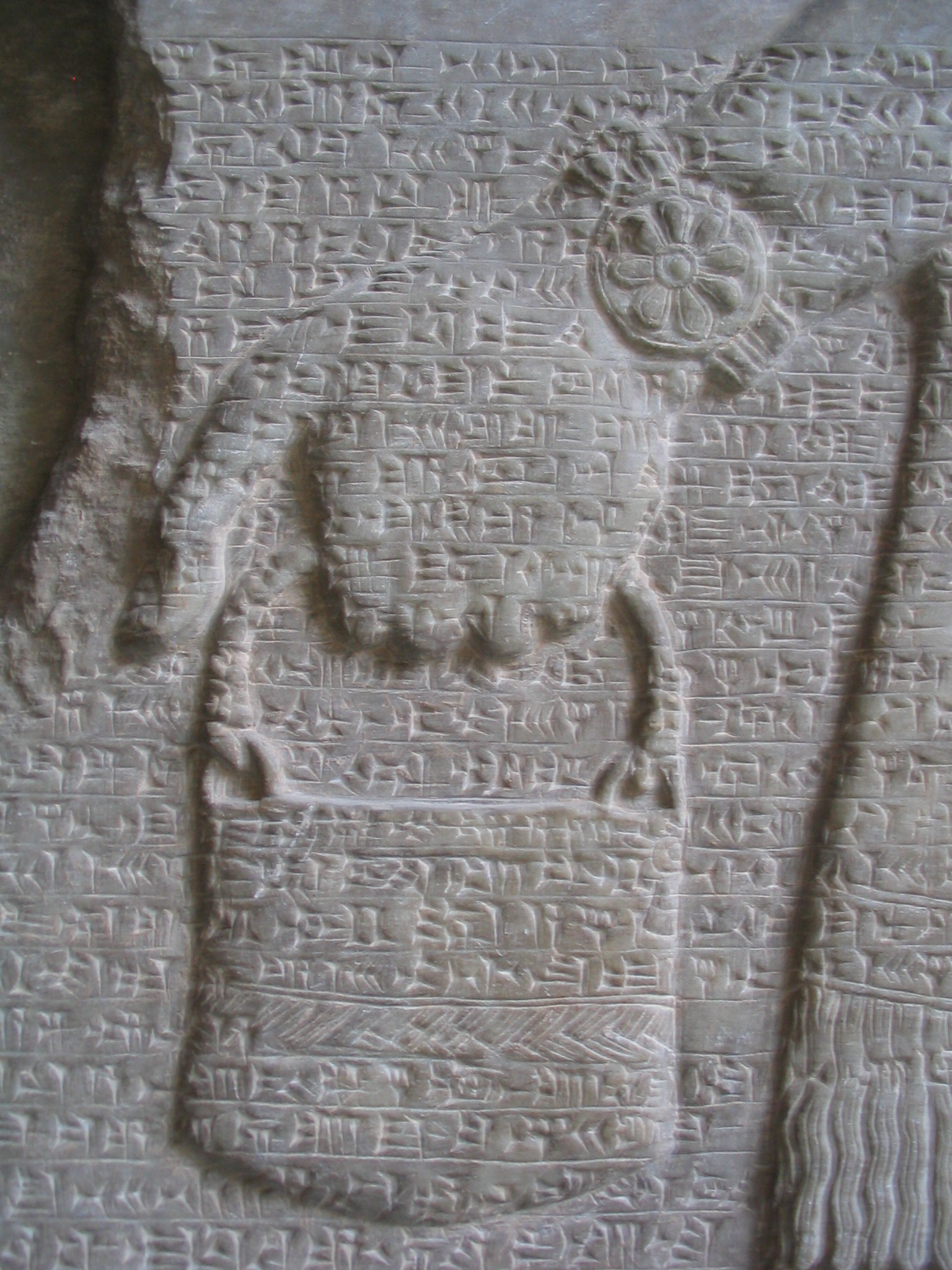 Escriptura cuneïfore en un relleu babiloni al Museu de Pèrgam de Berlin